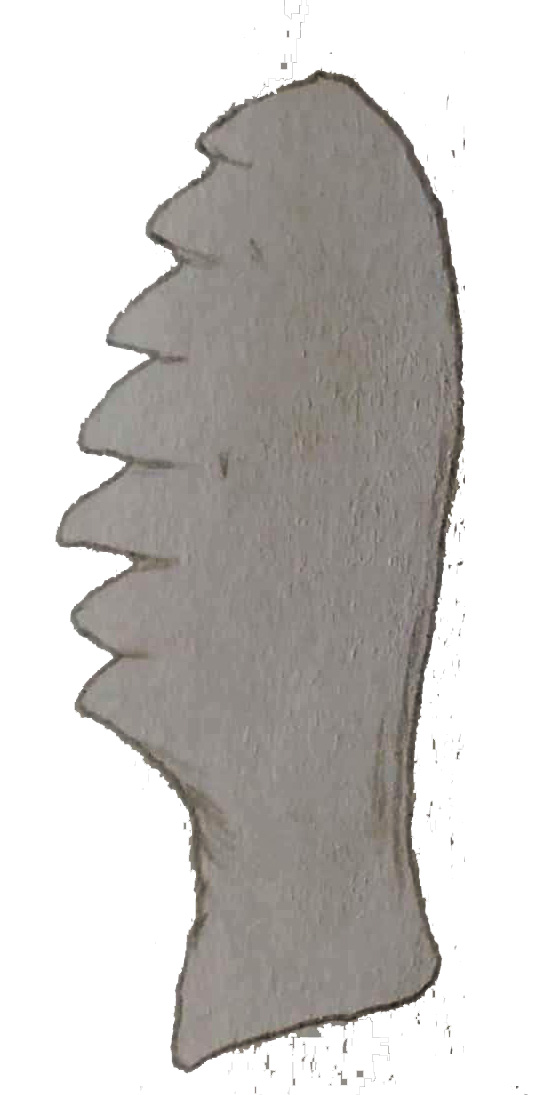 Pristerodon agilis tooth